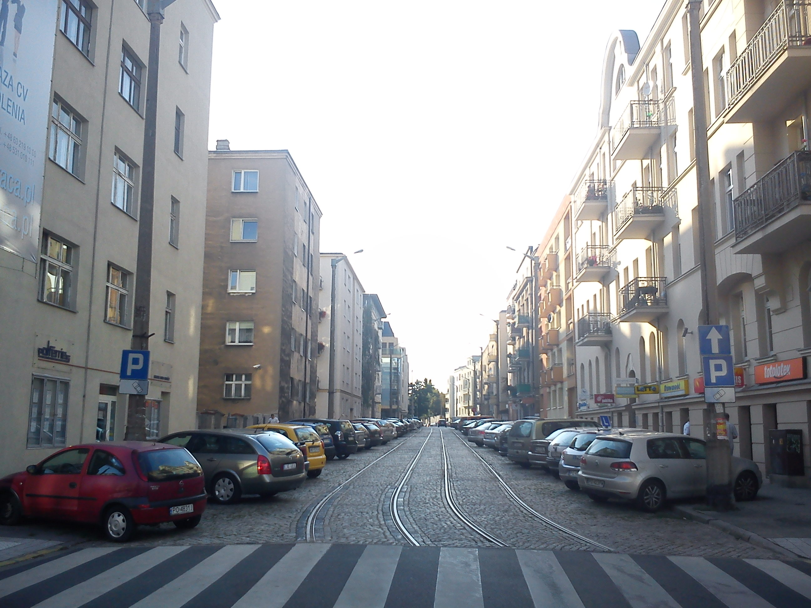 Sczanieckiej street, Poznań